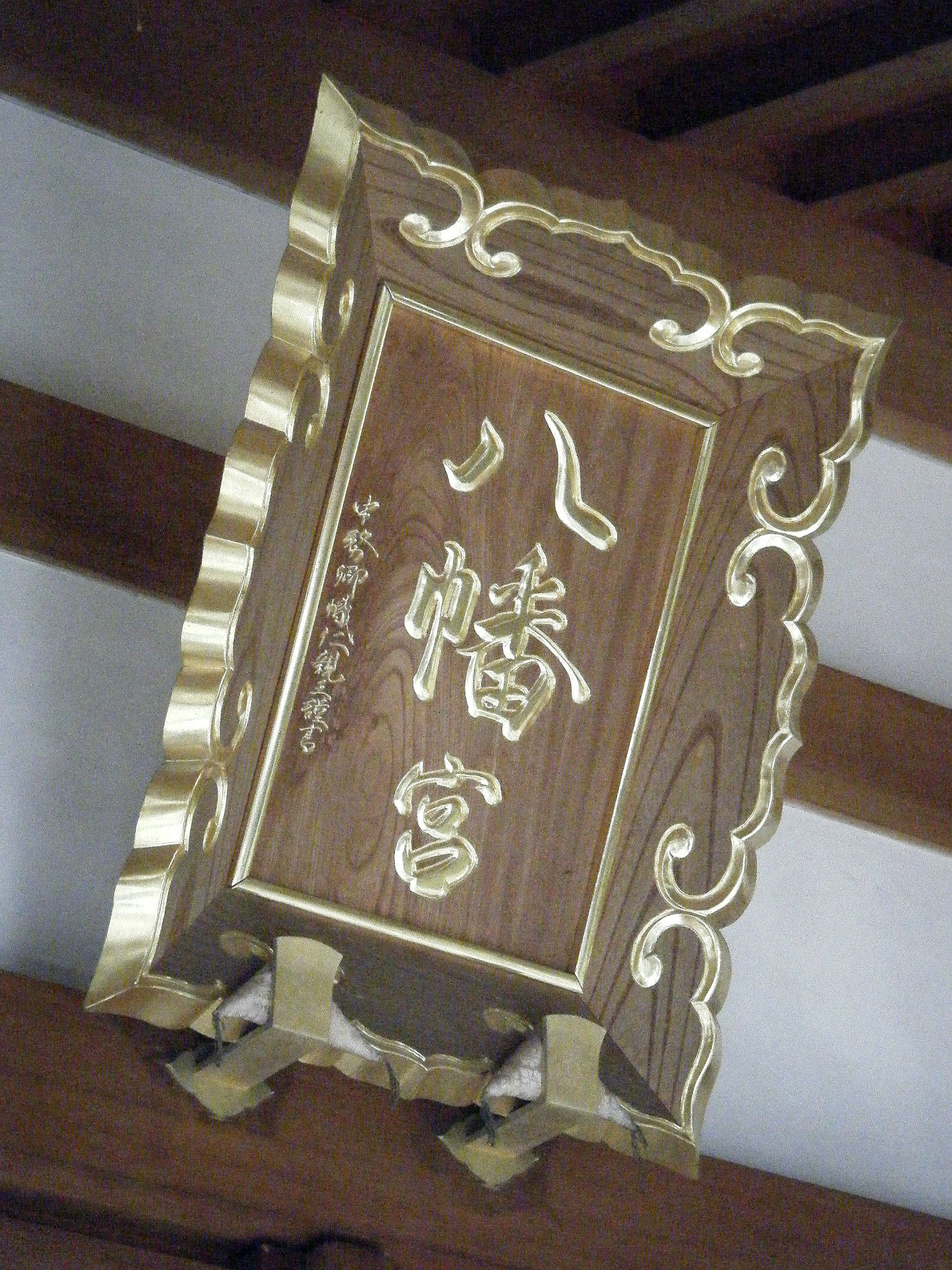 鳴尾八幡神社 社殿扁額